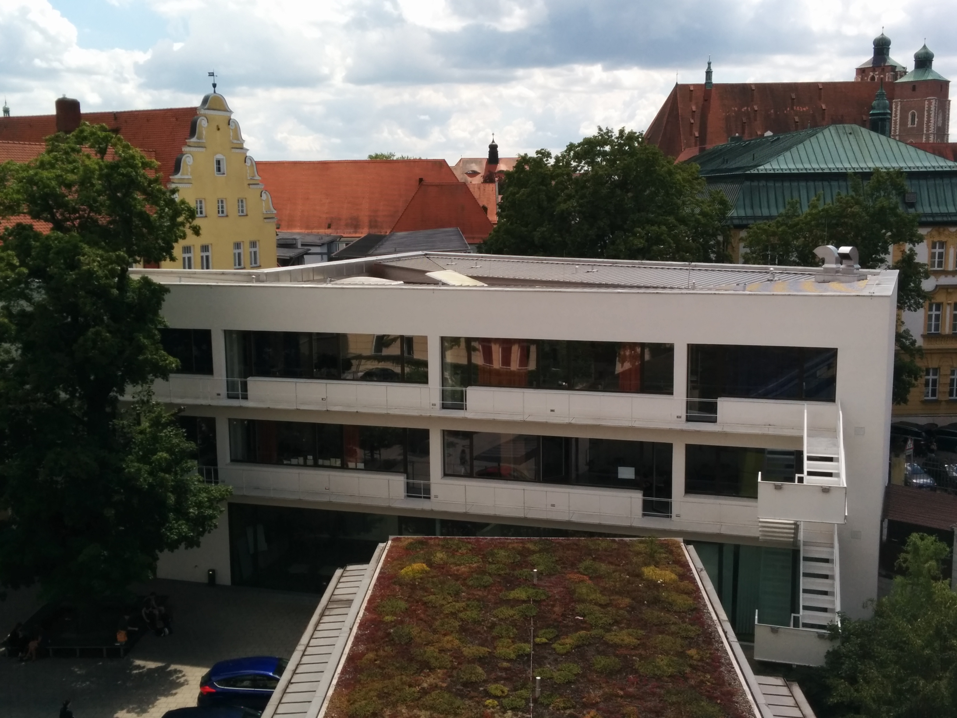 Ansicht des Erweiterungsbaus des Reuchlin Gymnasiums Ingolstadt aus Sicht des Altbaus